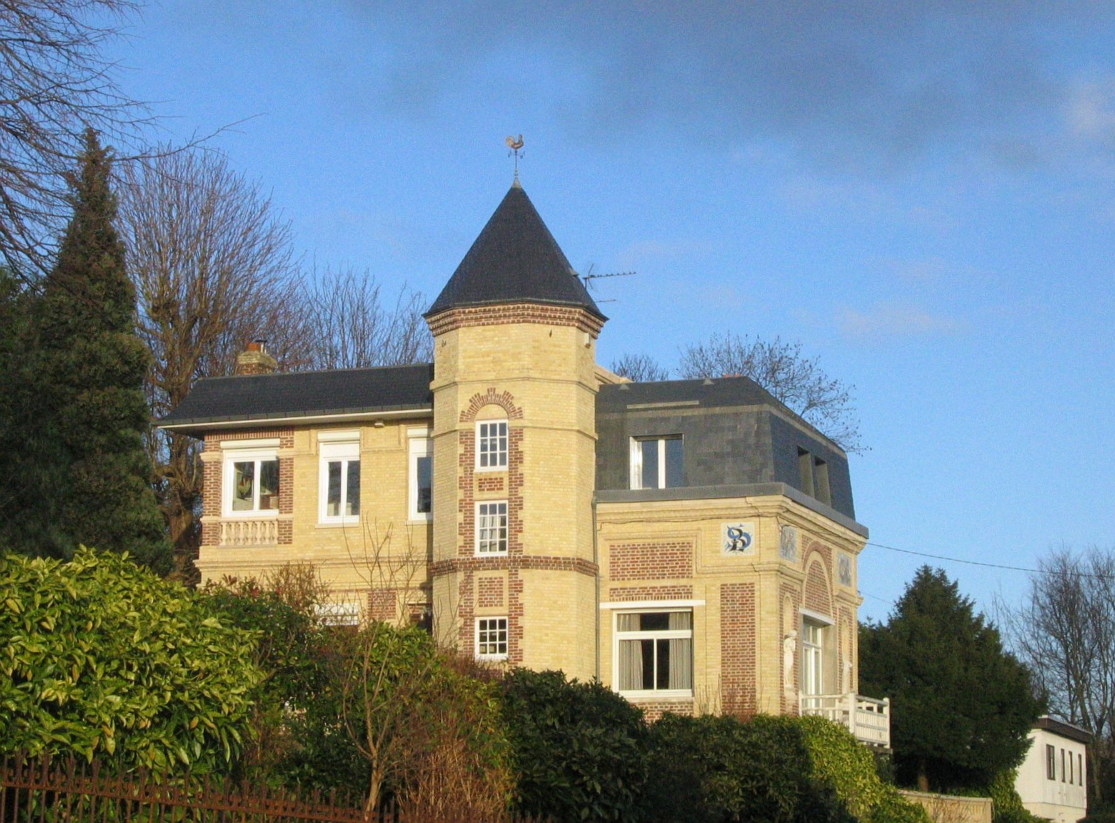 Villa de Sarah Bernardt, à Sainte-Adresse, Seine-Maritime